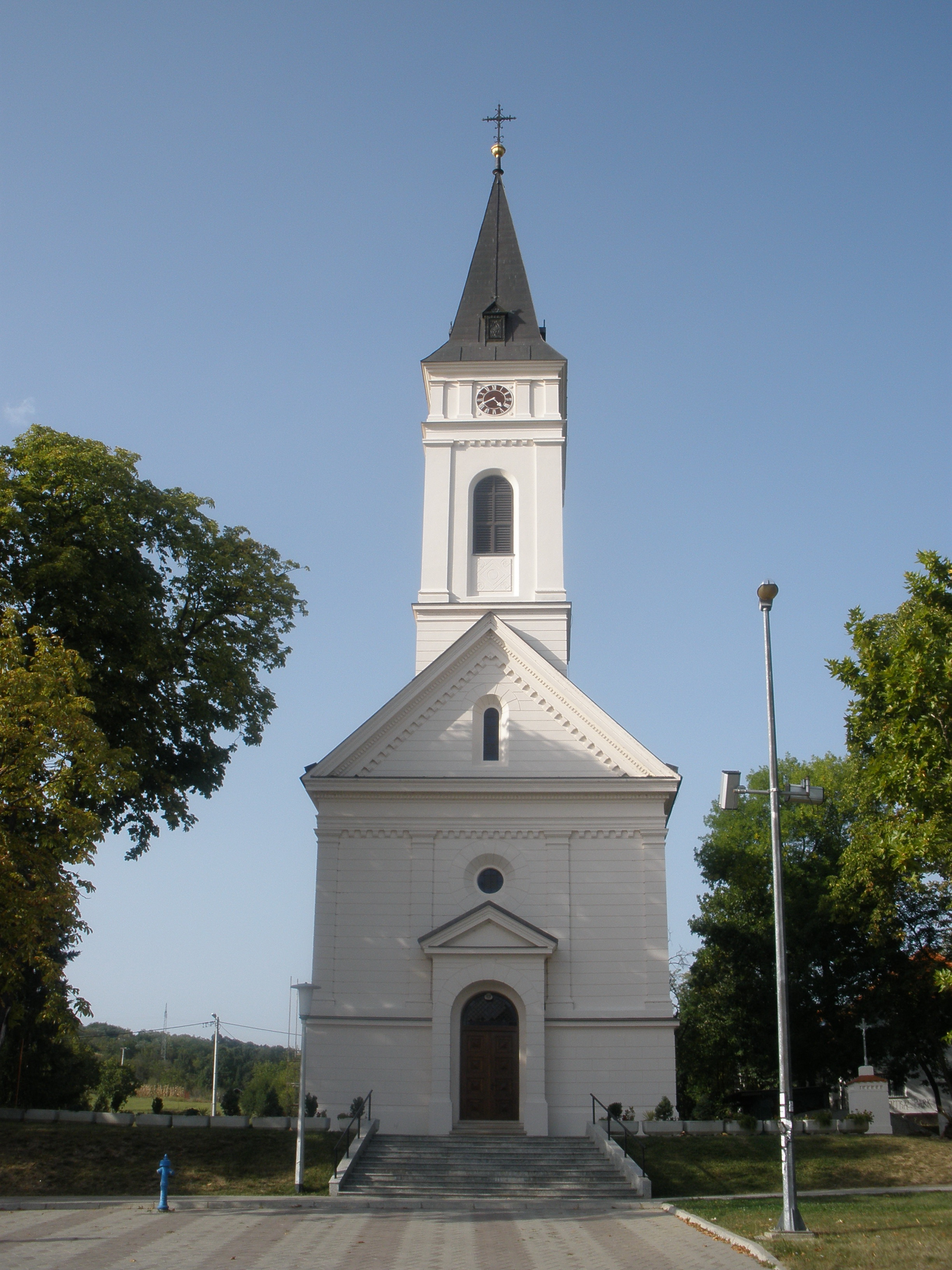 Crkva Sv. Antuna Padovanskog u Podvinju, Slavonski Brod.